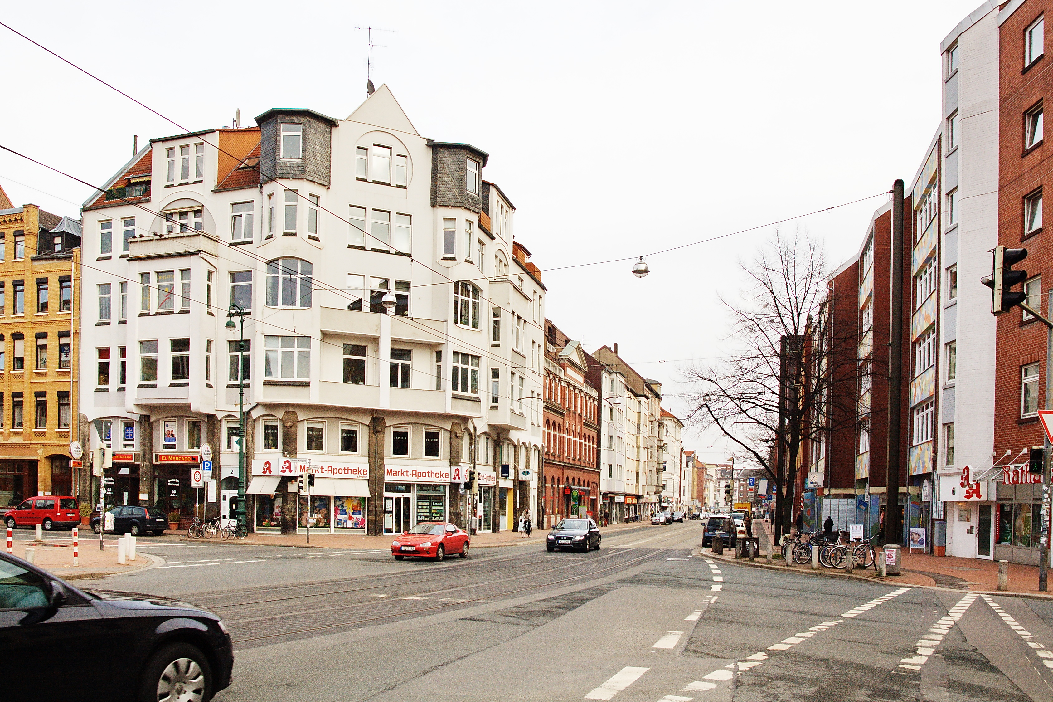 Geburtshaus der Publizistin Hannah Arendt am Lindener Marktplatz 2 (Hannover), Niedersachsen, Deutschland